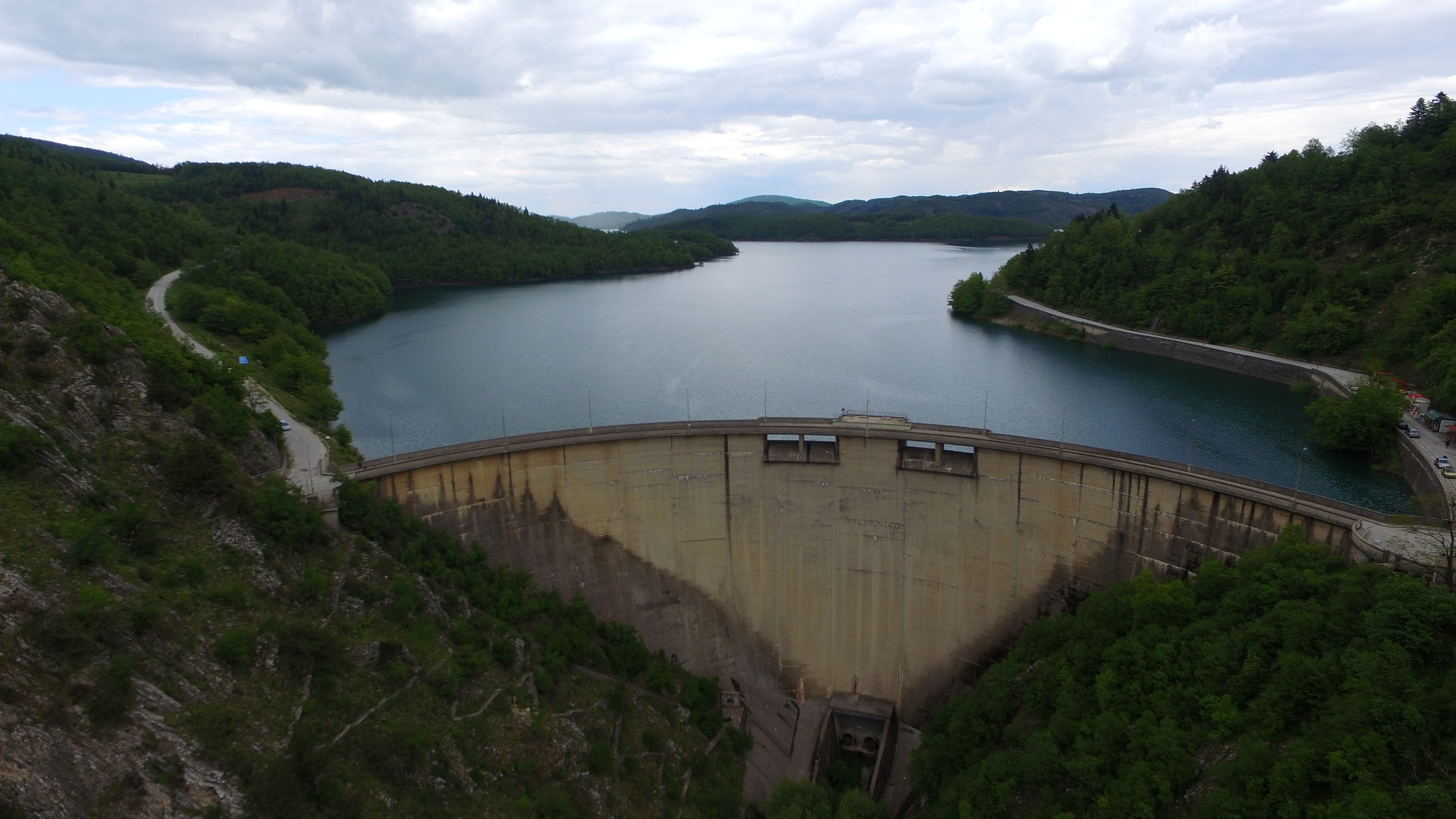 φράγμα λίμνης Πλαστήρα